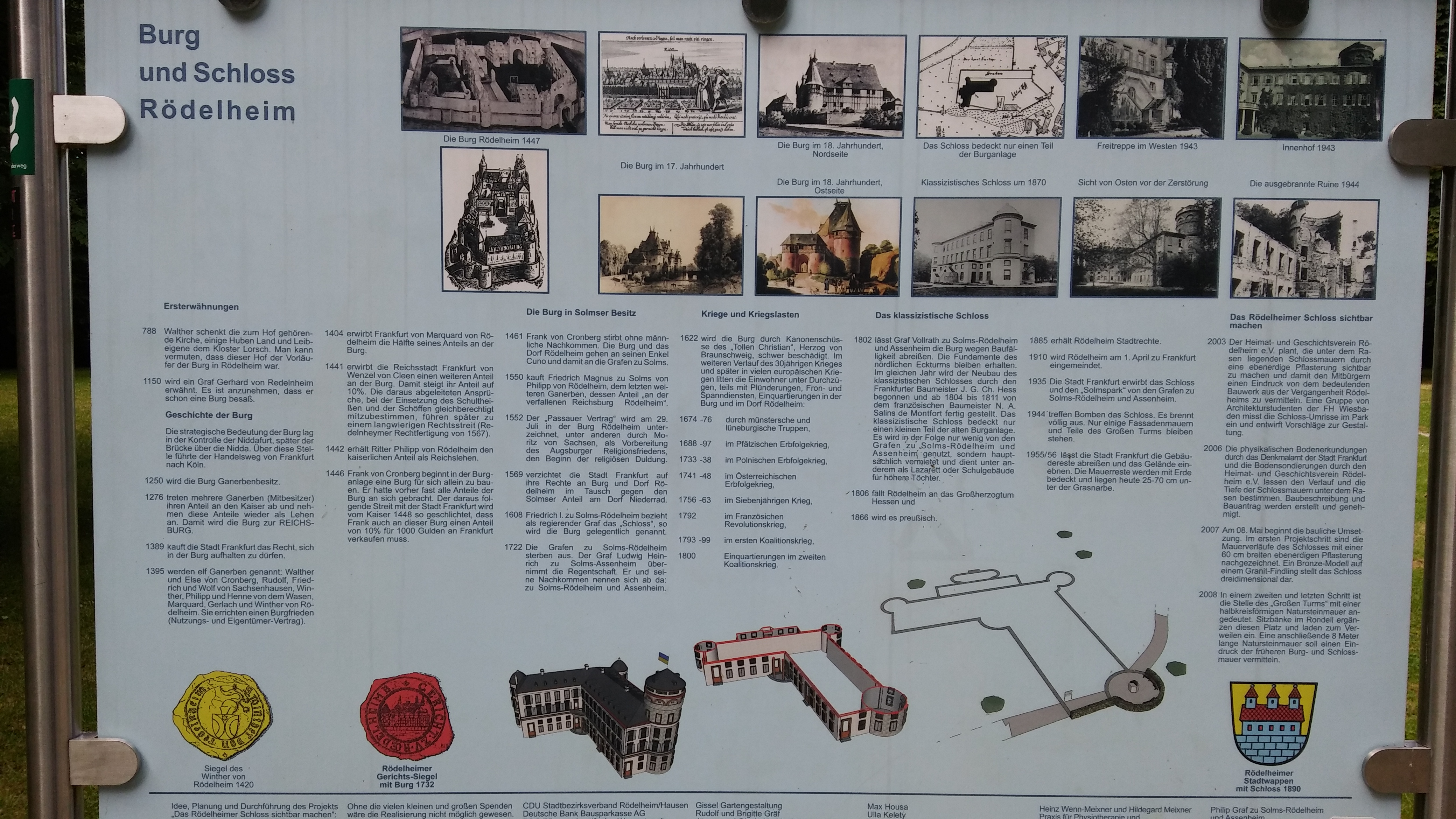 Solmspark_Entstehung der Burg bzw Schloss